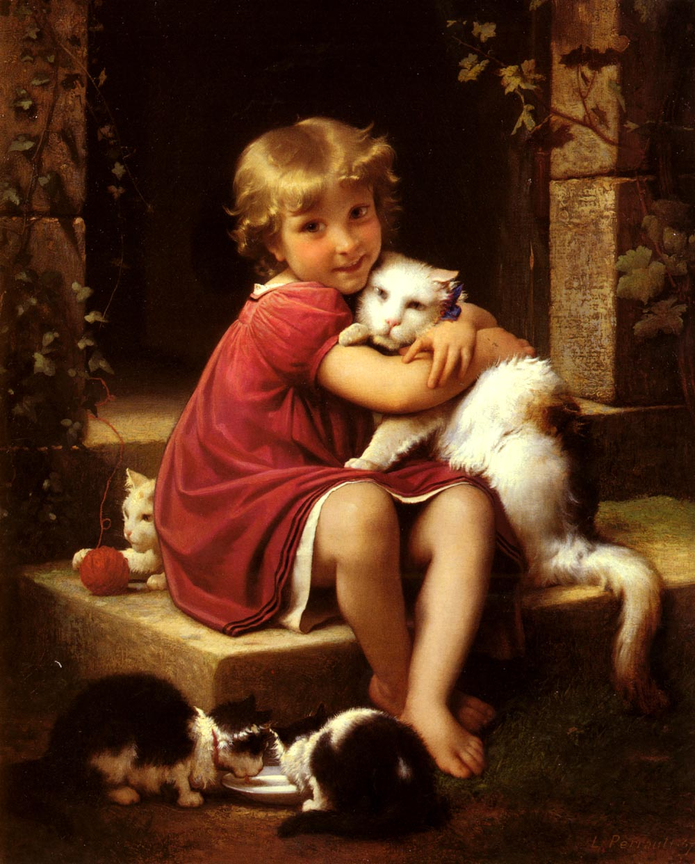 Son favori